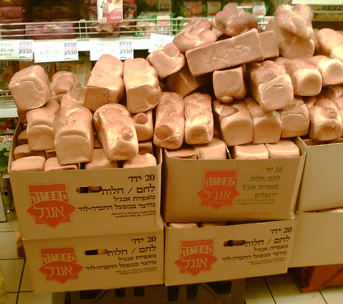 חלות של מאפיות אנג'ל ממתינות לקונים